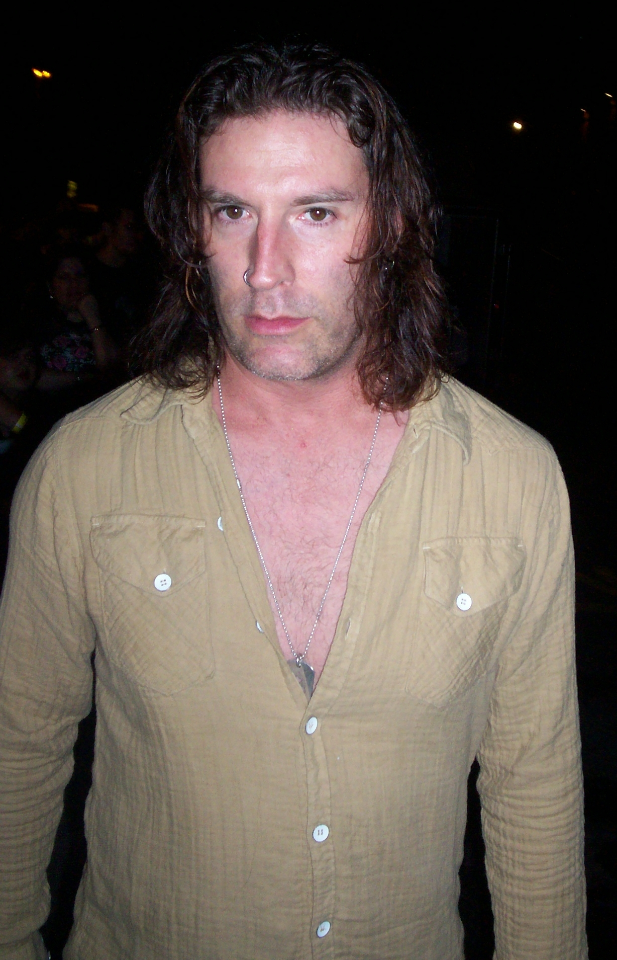 Alice in Chains taldeko Sean Kinney bateria-jotzailea 2006an. Taken at the 2006 show at the Starland Ballroom in Sayerville, New Jersey.